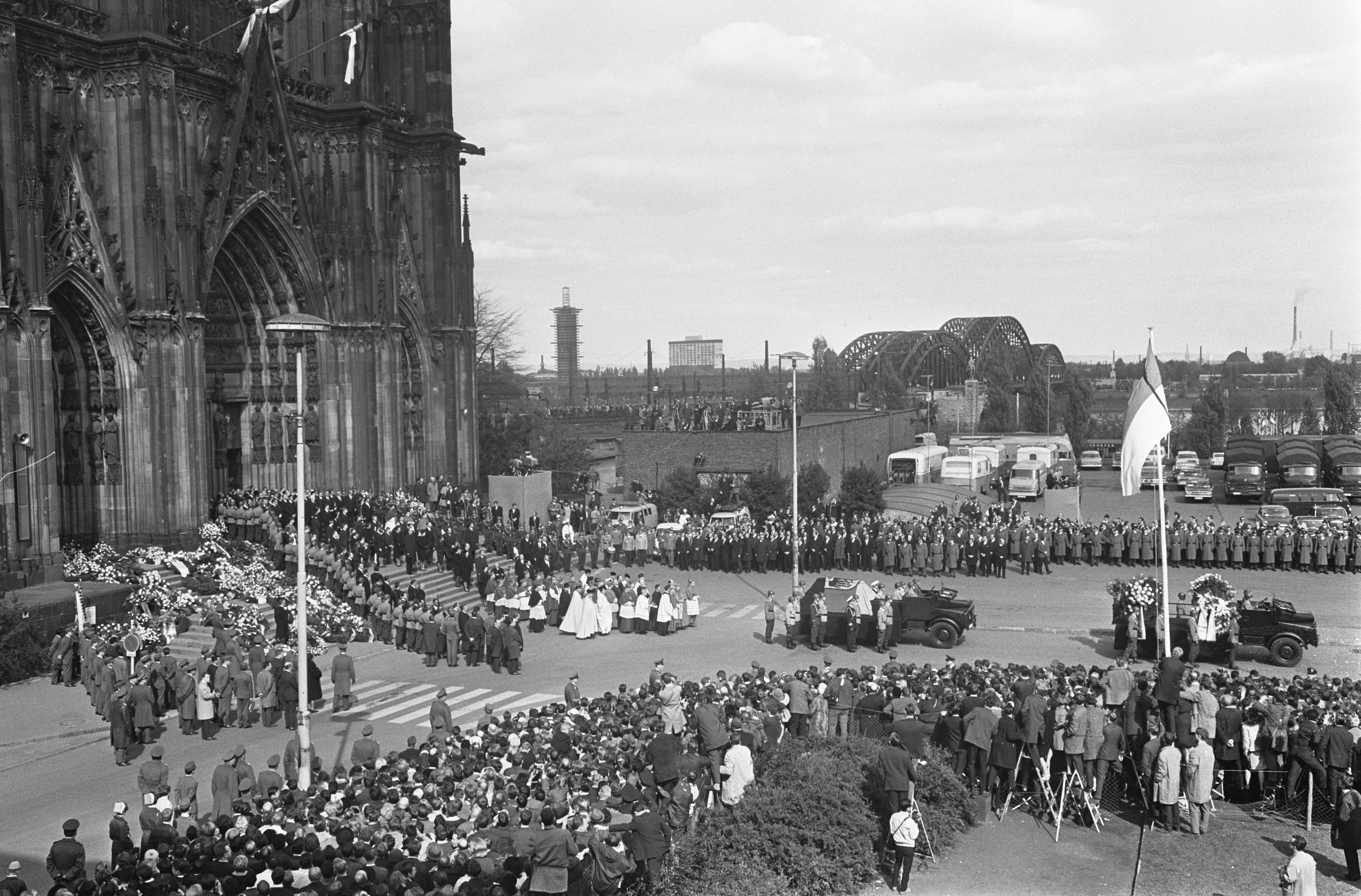 Collectie / Archief : Fotocollectie Anefo Reportage / Serie : [ onbekend ] Beschrijving : Begrafenis Adenauer, overzichten bij Dom te Keulen Datum : 25 april 1967 Locatie : Keulen Trefwoorden : begrafenissen Persoonsnaam : Adenauer, Konrad Fotograaf : Koch, Eric / Anefo Auteursrechthebbende : Nationaal Archief Materiaalsoort : Negatief (zwart/wit) Nummer archiefinventaris : bekijk toegang 2.24.01.05 Bestanddeelnummer : 920-2643